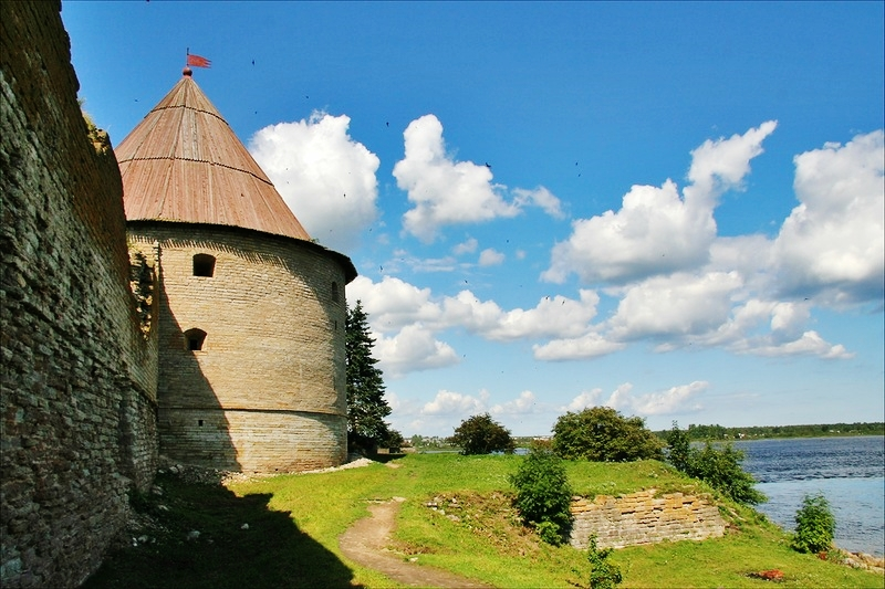 La Torre reale della Fortezza di Orešek